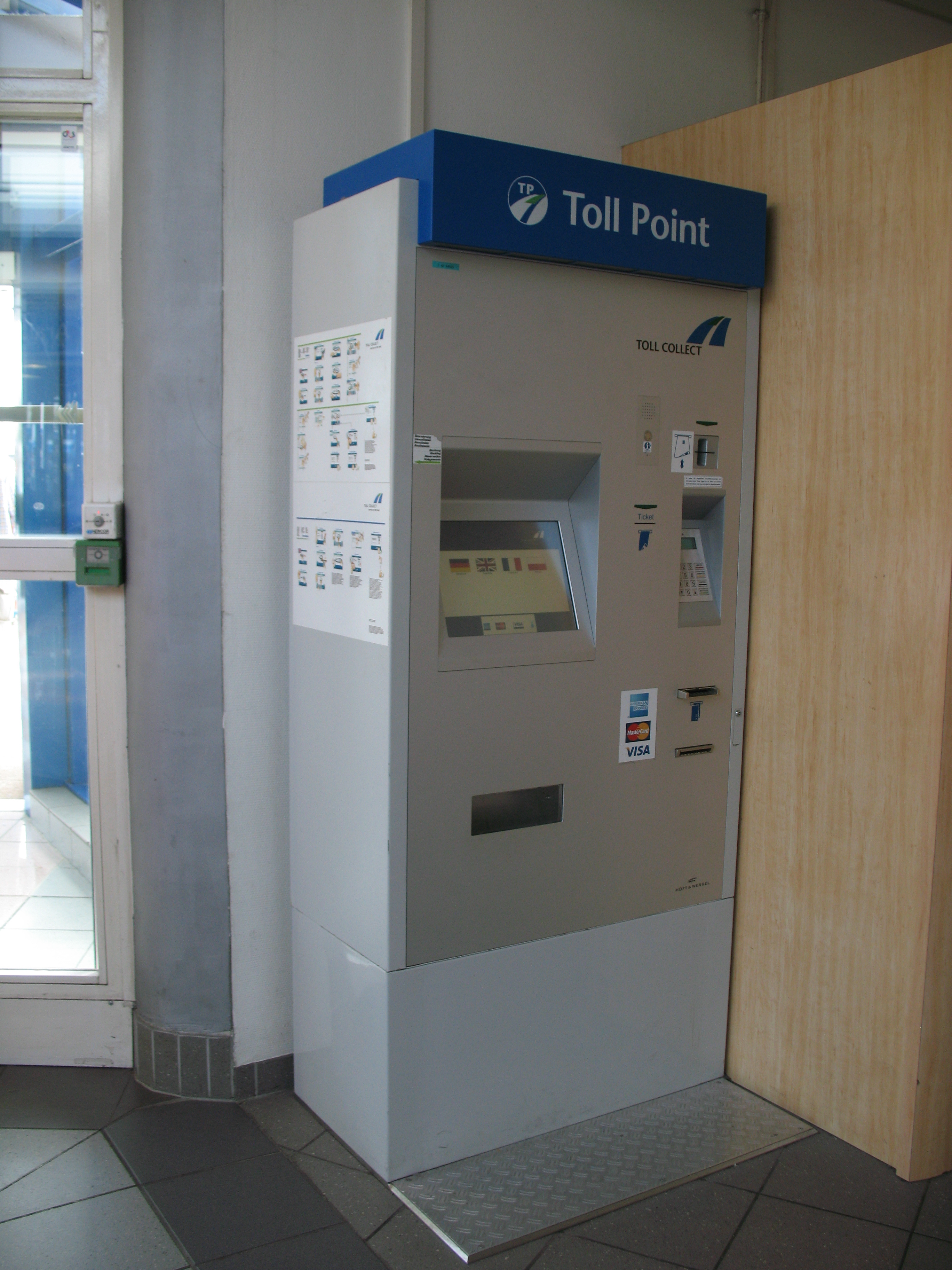 Point d'achat trajet autoroutier poids-lourds Toll Collect.